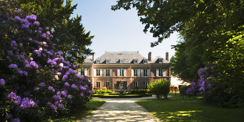 Vue du Château les Bruyères à Cambremer dans le Calvados